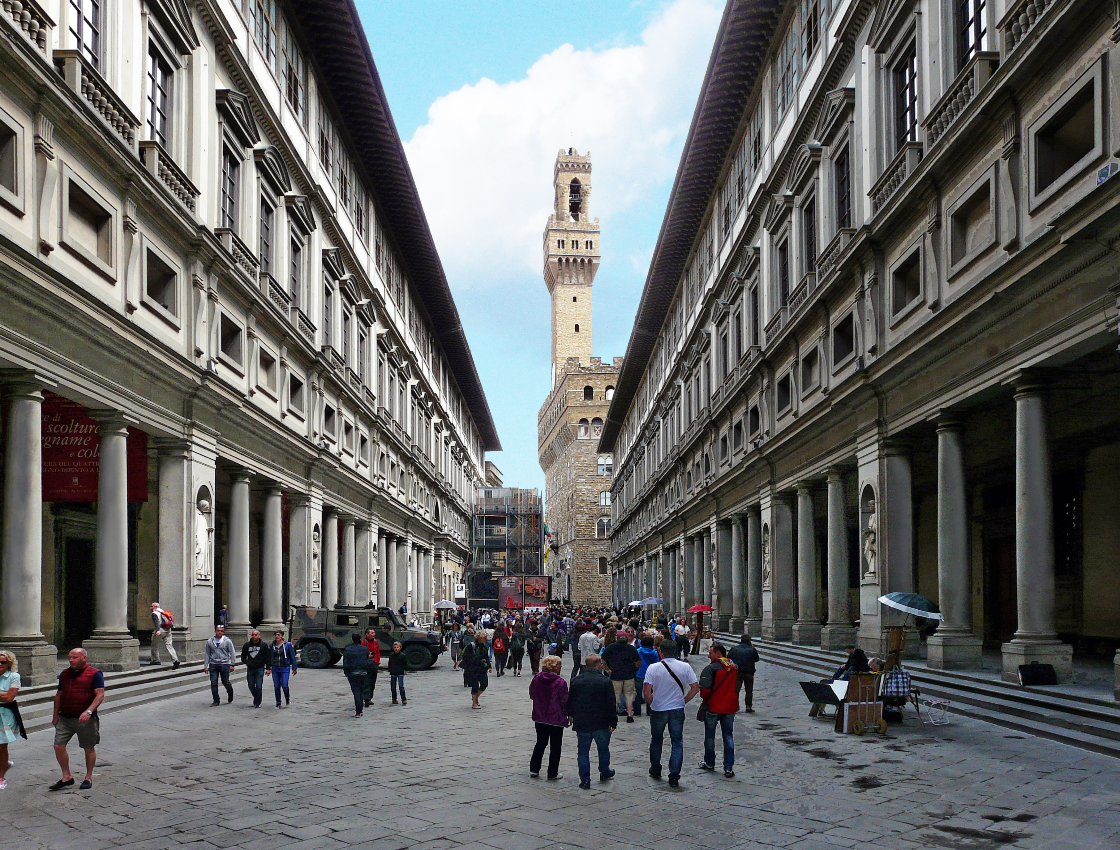 Галерея Уффици